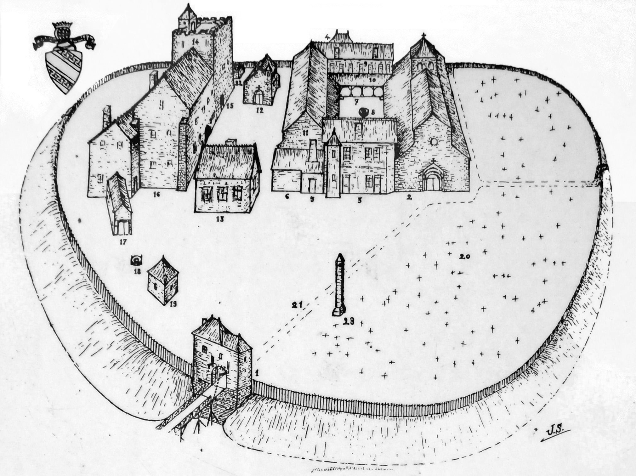 plan du Chateau st-Phal à Isle-Aumont avec sa chapelle. Travail publié avec l'aide de l'association de l'église aux trois sanctuaires.